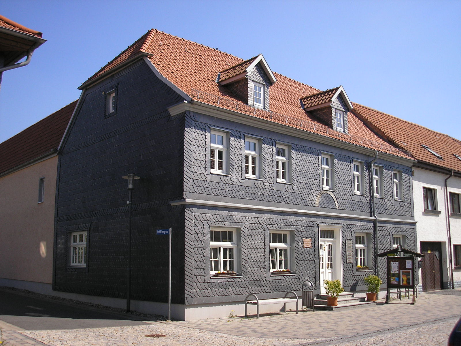 Geburtshaus des Dichters Wilhelm Heinse in Langewiesen (Thüringen). Heute ist hier ein Museum untergebracht.